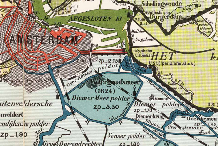 Diemermeerpolder